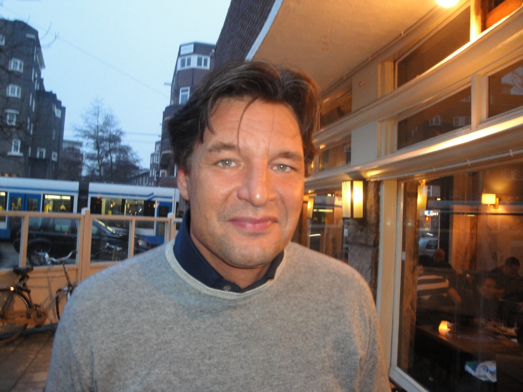 Edwin de Roy van Zuydewijn